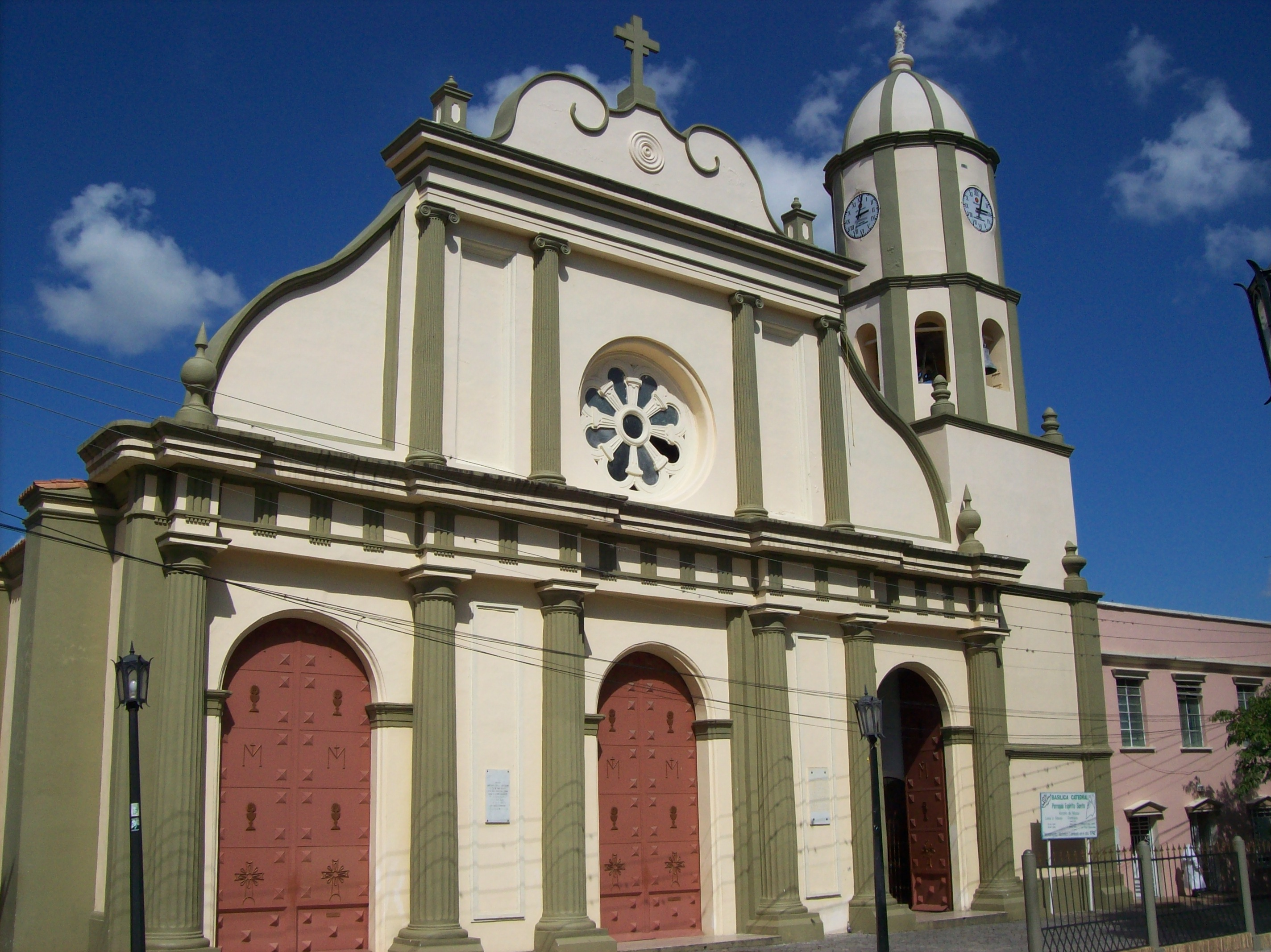 Catedral de Nuestra Señora de Coromoto en Guanare, capital del estado Portuguesa. Venezuela